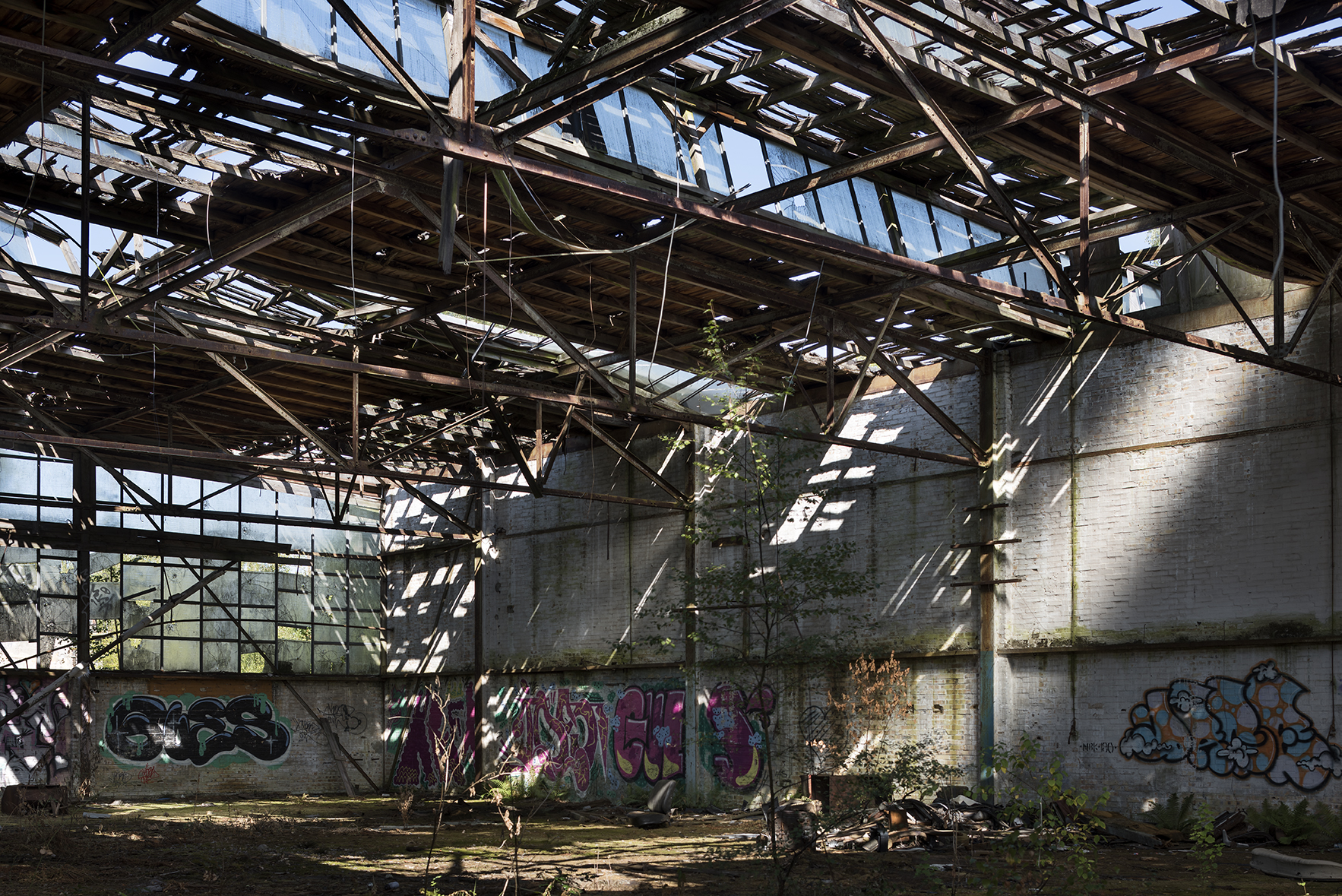 Flugplatz Rangsdorf, Innenansicht des Sonderbaus gegen Norden.